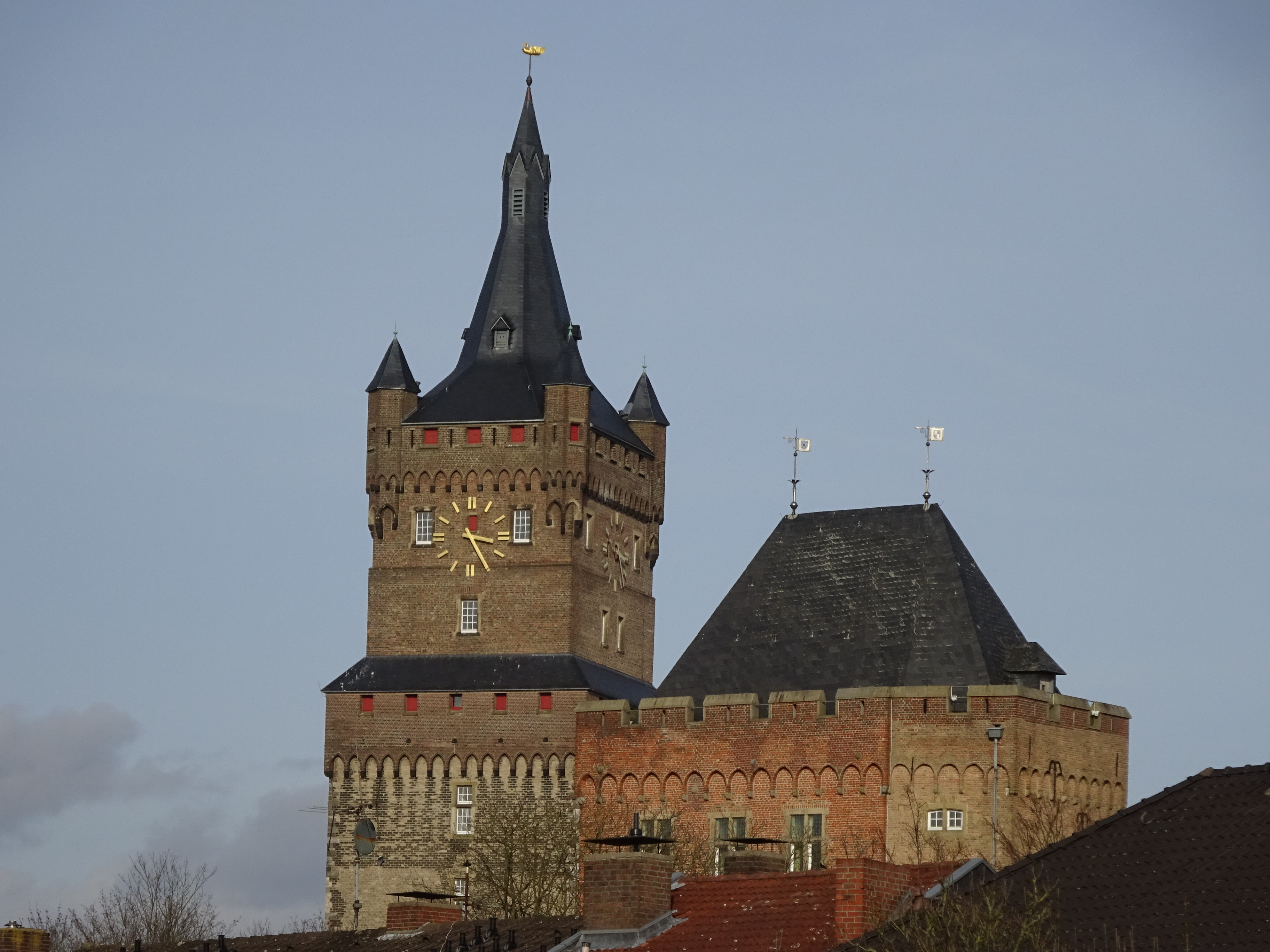 Kleve, Schwanenturm gezien vanaf de trappen bij de Stiftskirche / Kleiner Markt